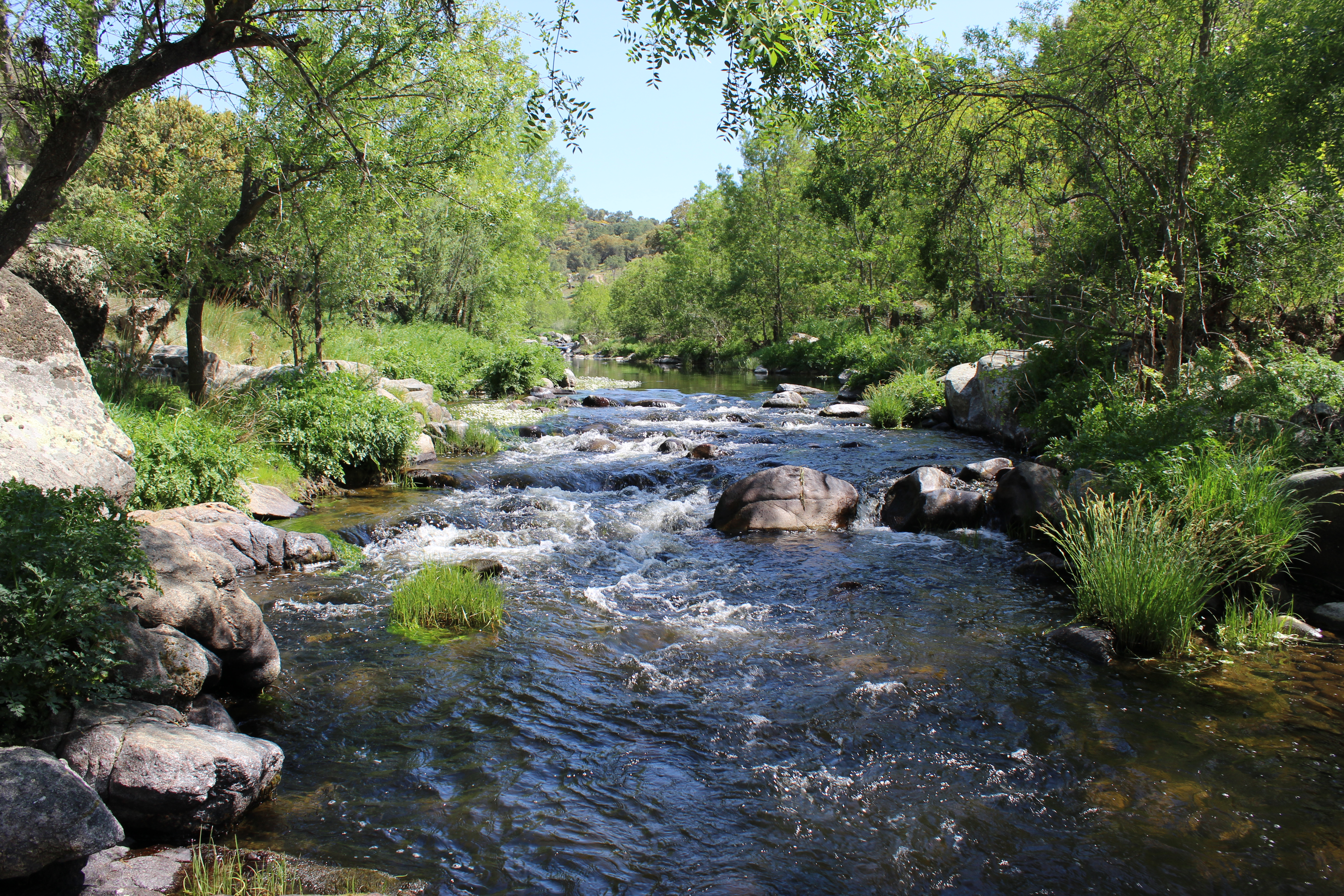 Río Tiétar, provincia de Toledo.